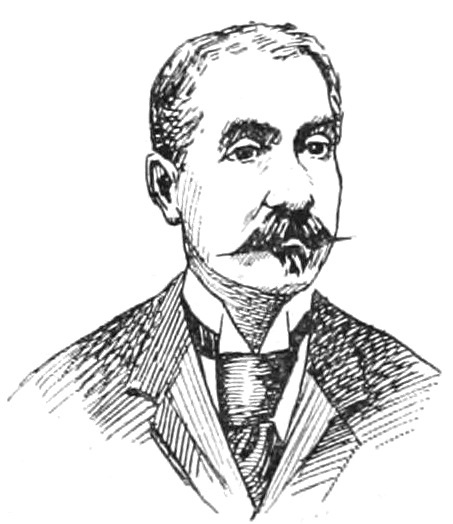 "La Nouvelle Chambre" : "Alasseur".